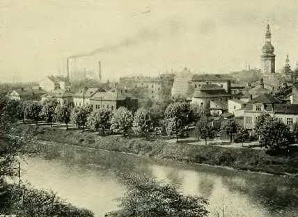 Moravská Ostrava, celkový pohled na město, vlevo věž kostela svatého Václava